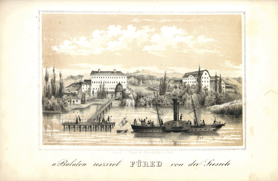 Füred. a Balaton reszirol – von der Seeseite Szeremley Miklós: Balaton albuma, illusztráció, 1851. A kép előterében a Kisfaludy gőzhajó a Balaton első jelentősebb utasszállító lapátkerekes gőzhajója az első balatoni útján amely 1846. szeptember 21-én indult Füredről. Az I. osztály belső burkolata fehér és arany volt, mahagónioszlopokkal, a falakon tükrökkel. Párnázott ülések, tágas étkezőhelyiség állt az utasok rendelkezésére, továbbá könyvtár, magyar és külföldi szerzők műveivel, napilapokkal.